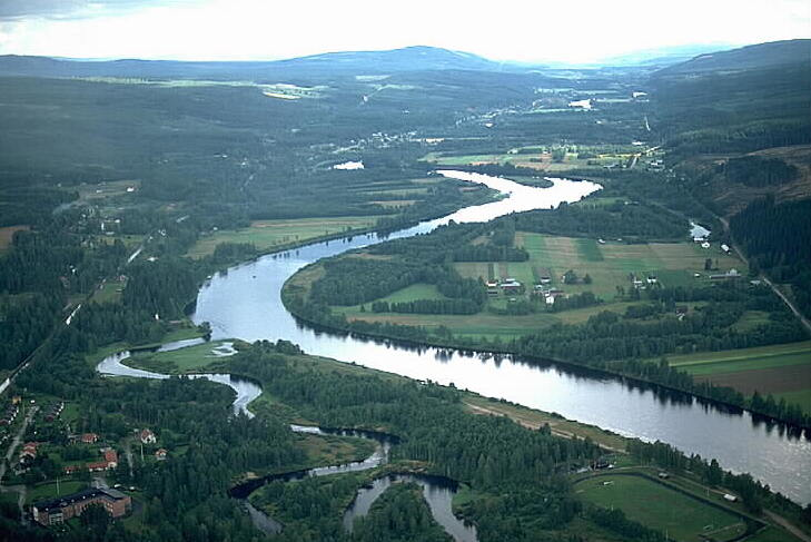 Område med fångstgropssystem. Motiv: Likenäs Nyckelord: Flygbilder, Riksintressen Kategori: Insjömiljöer Område med fångstgropssystem.